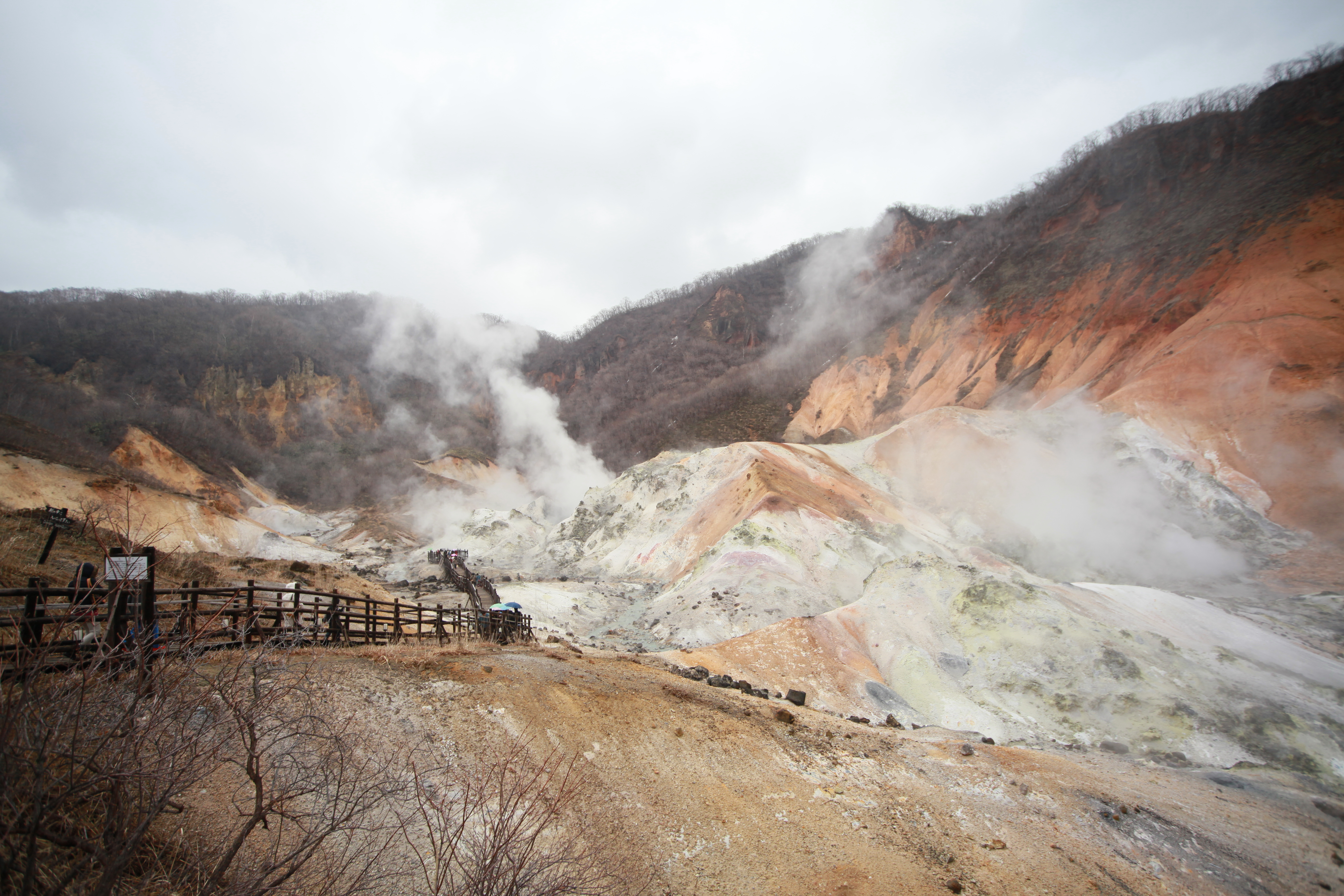 登別温泉の地獄谷